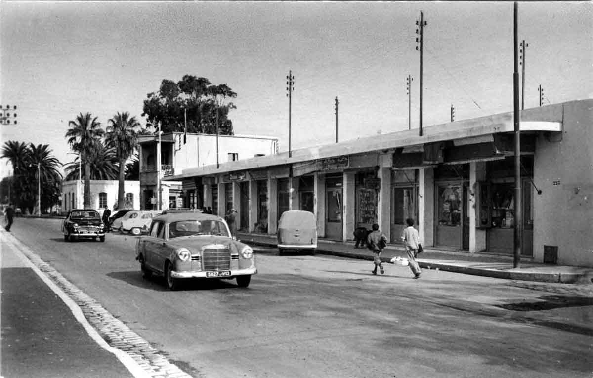 Le Kram Avenue Habib Bourguiba 1964